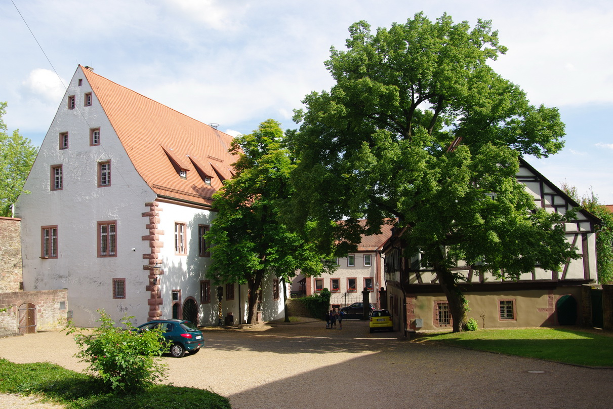 Kurmainzer Amtskellerei in Buchen (Odenwald)